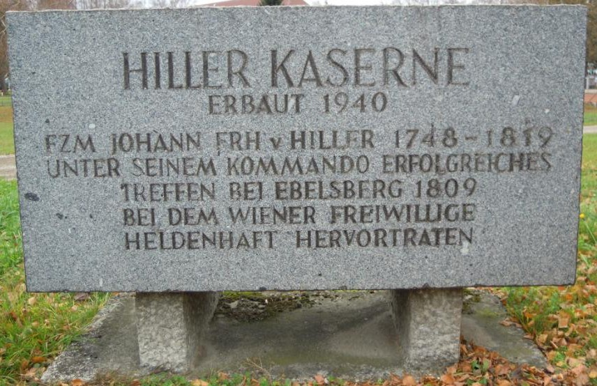 Gedenktafel Hillerkaserne